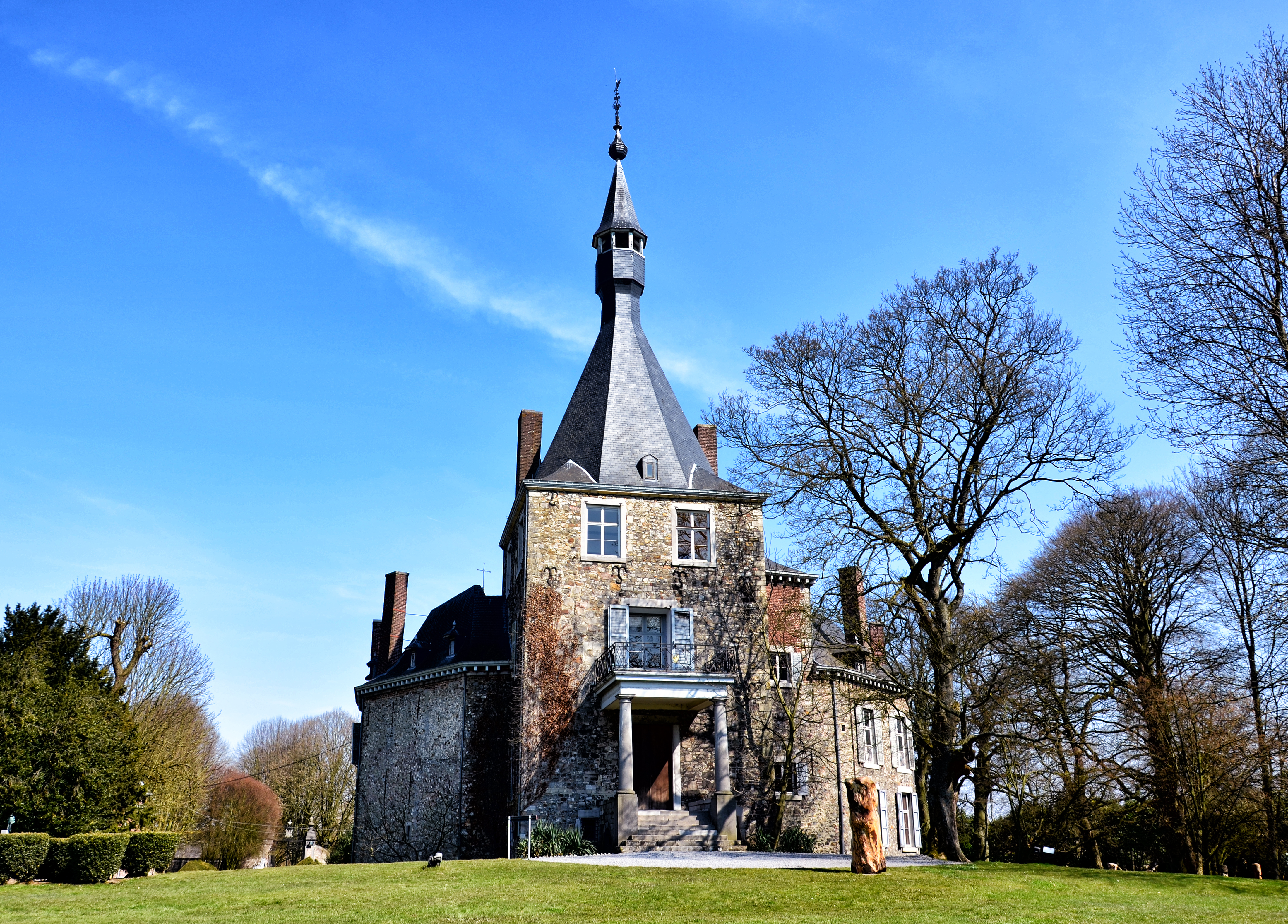 Château de Waroux à Alleur en Belgique